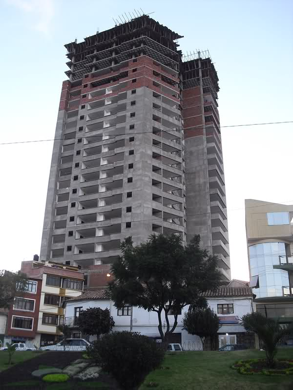 el edificio Roles en construcción, ya se levantaba el piso 22